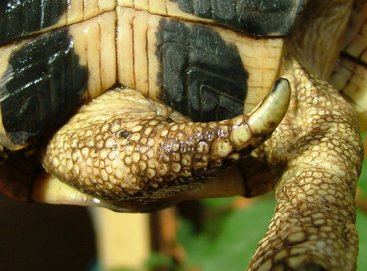 Testudo hermanni hermanni male var. laziale, astuccio corneo coda